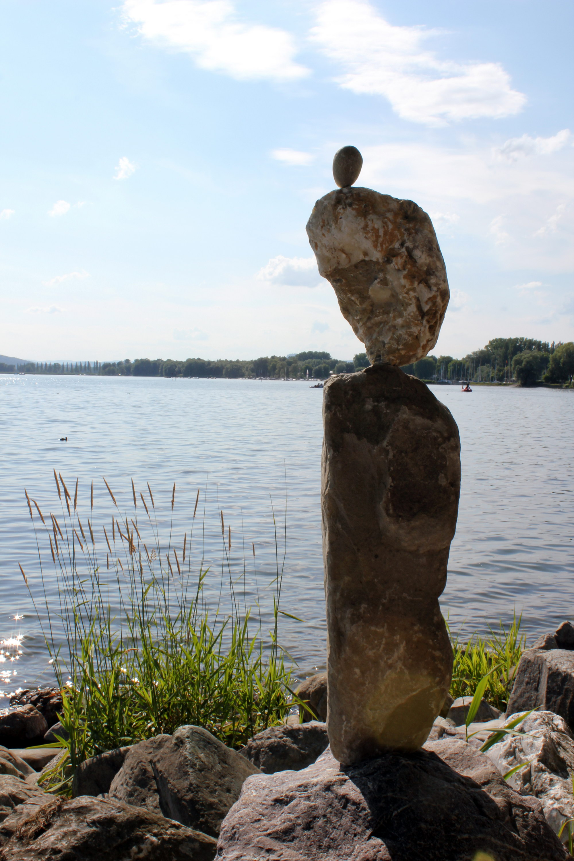 Steinkunst von Josef „Sepp“ Bögle, Radolfzell, Juni 2011